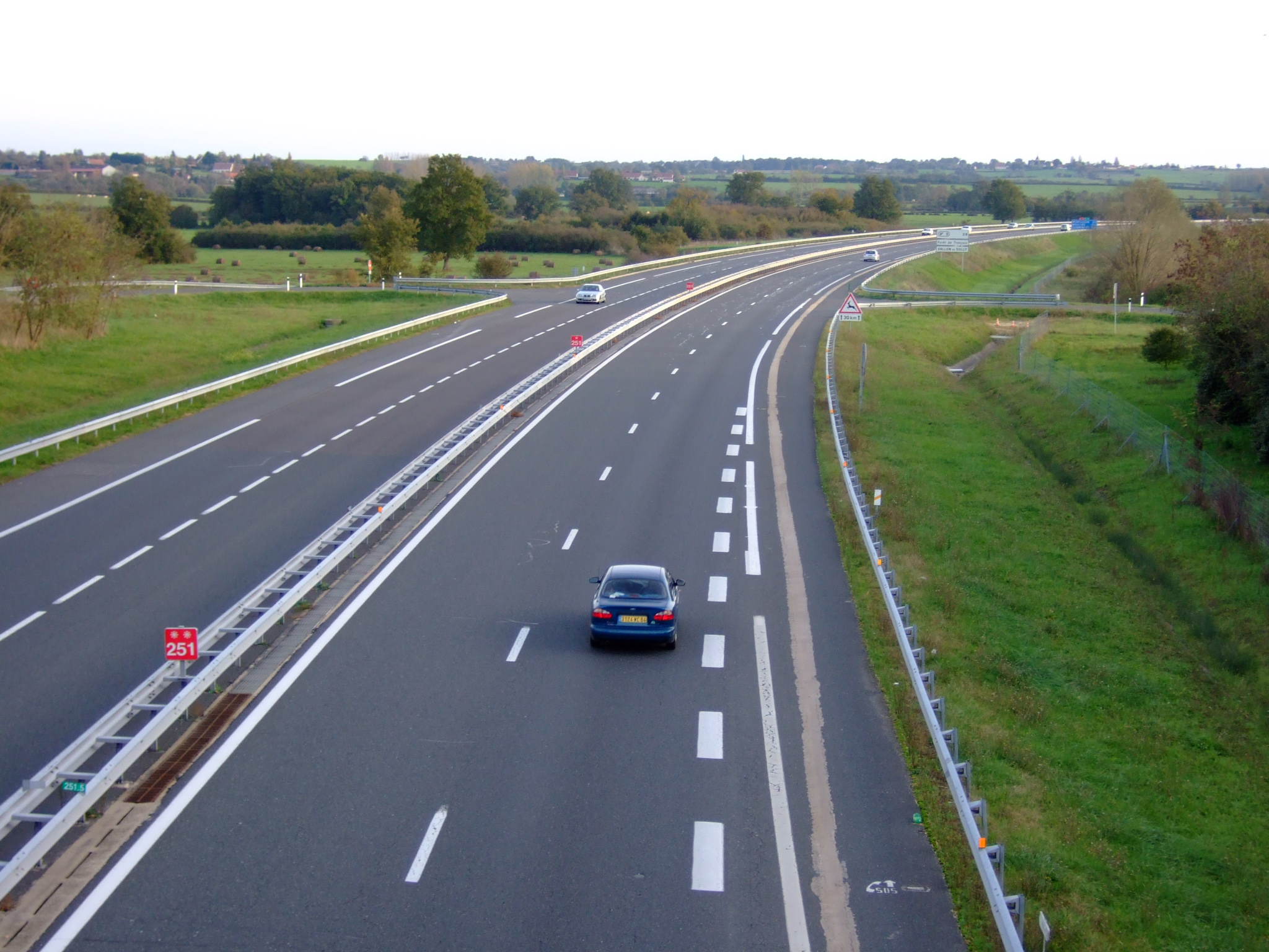 L'autoroute A 71 près de l'échangeur de Saint-Amand-Montrond - Photo amateur prise par moi-même